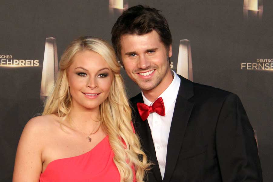 Jana Kilka und Thore Schölermann beim Deutschen Fernsehpreis 2012